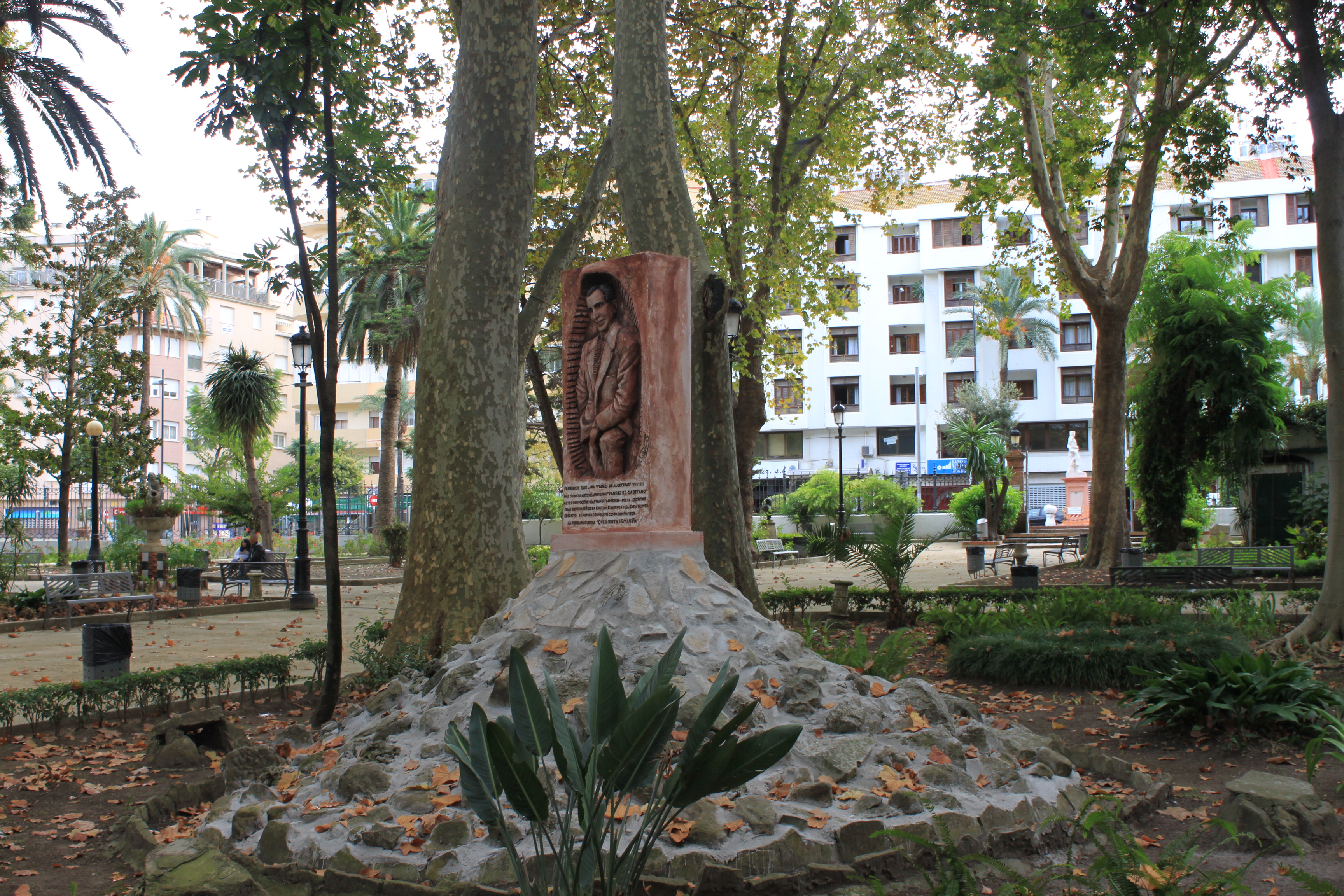 Monumento a Florencio Ruiz Lara, Flores El Gaditano, situado en el paseo Cristina de su ciudad de nacimiento Algeciras desde octubre de 2010.